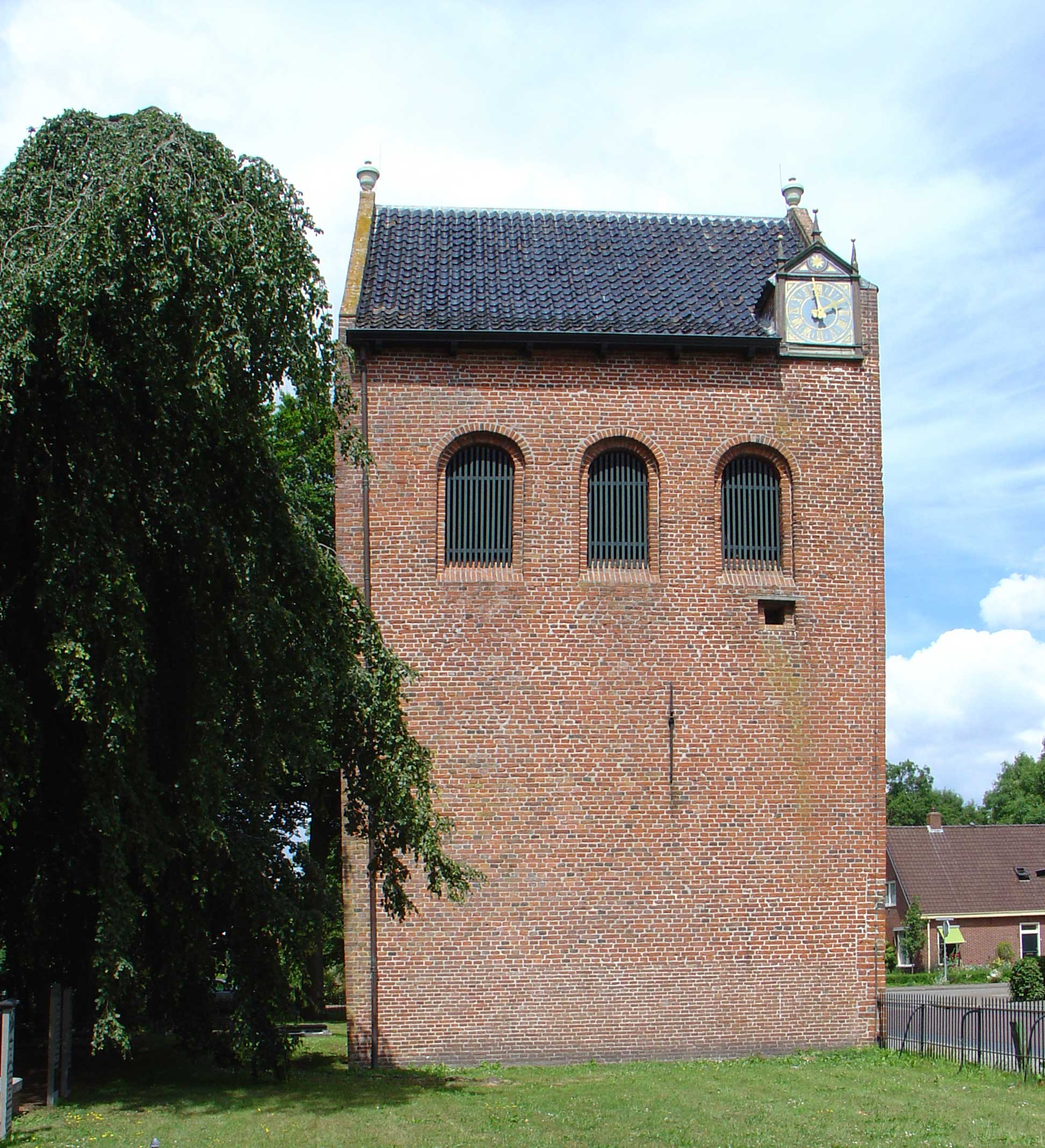 Klokkentoren van de kerk van Noordbroek